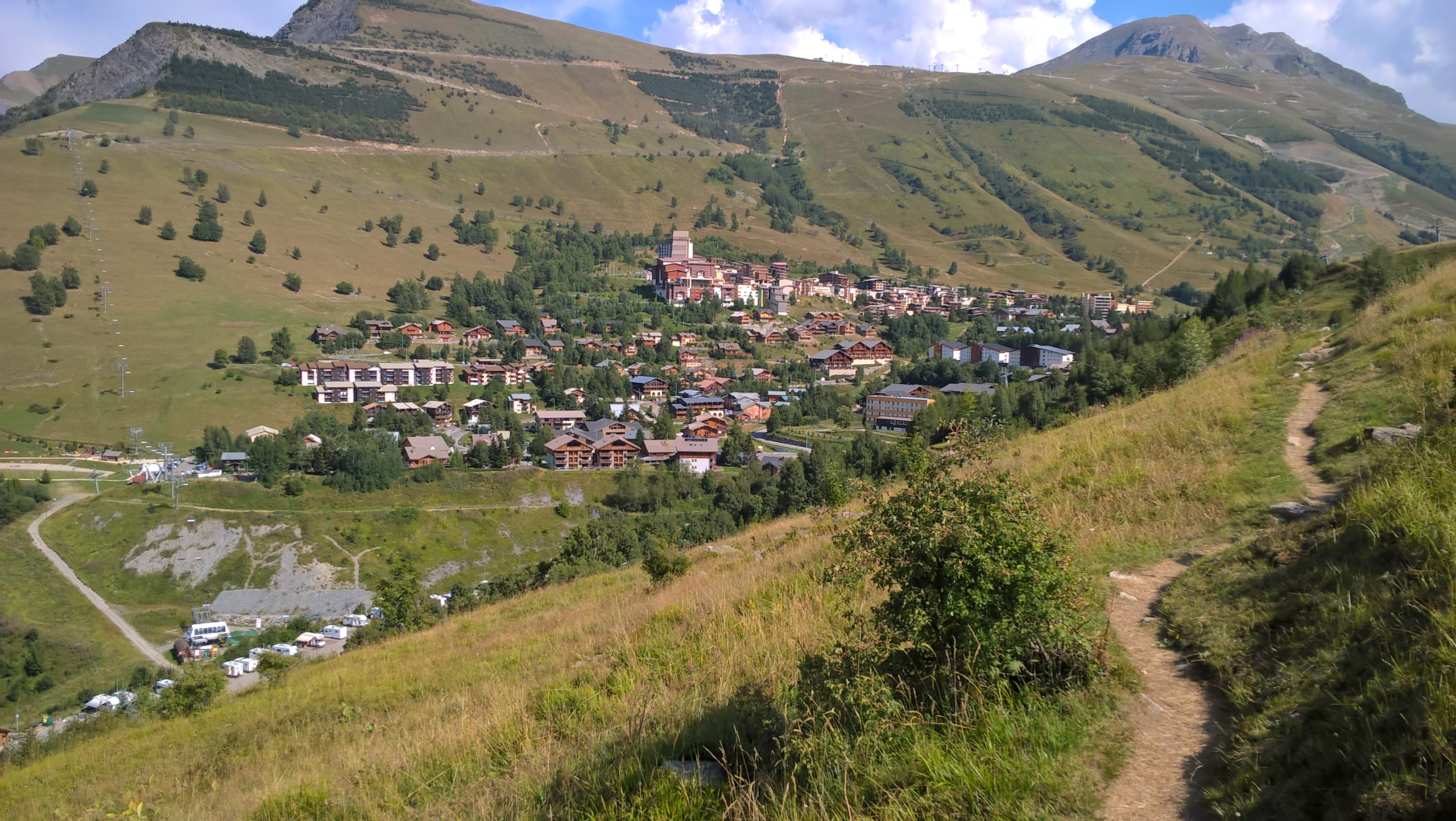 Station Les Deux Alpes en aout 2016